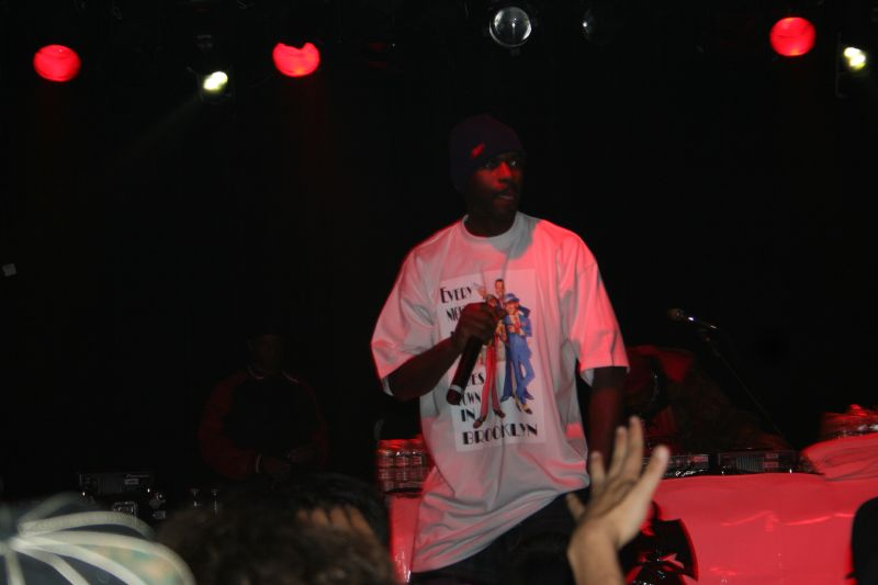 Masta Killa performing in San Francisco, California.